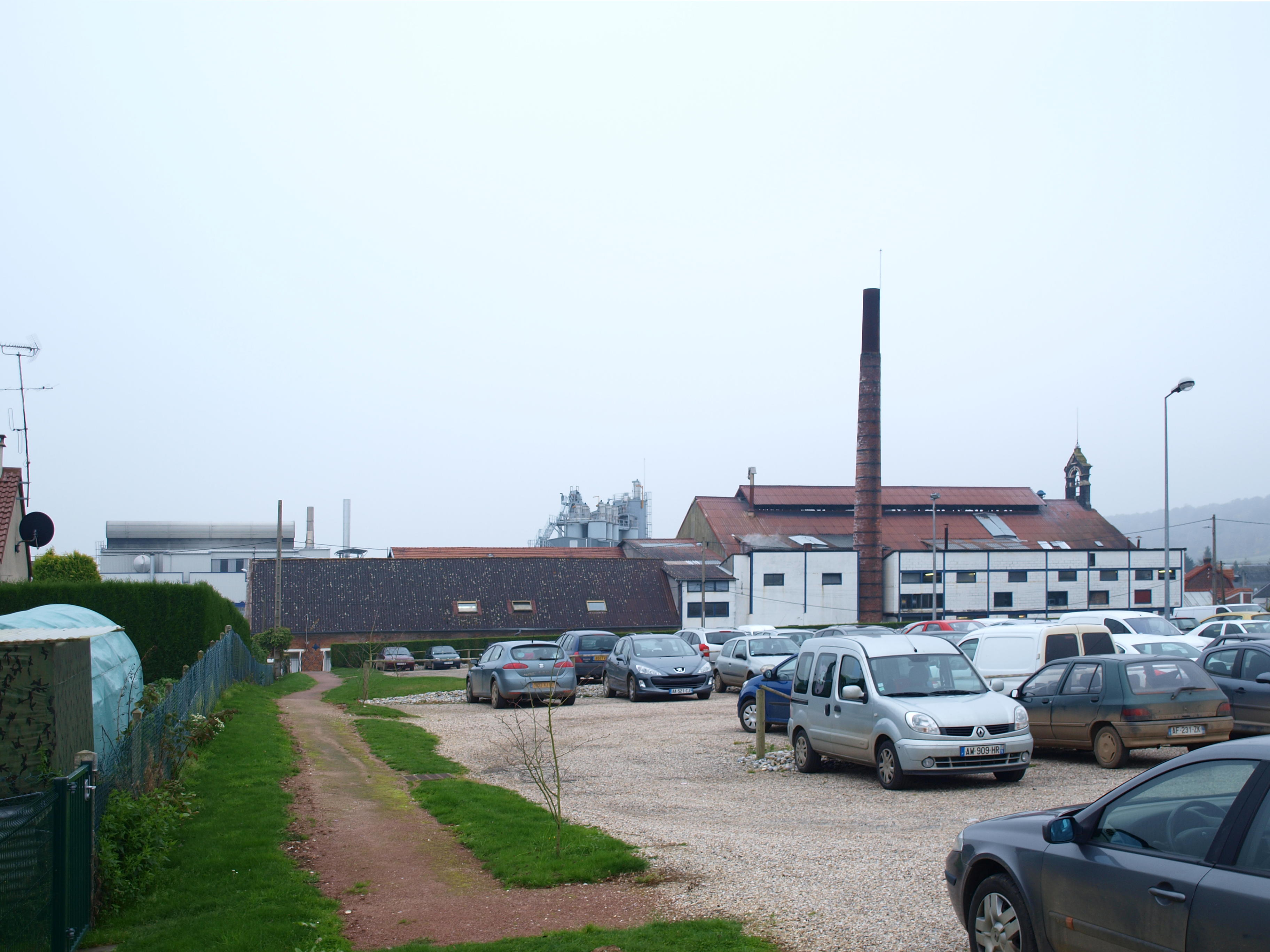 Vieux-Rouen-sur-Bresle ( Seine-Maritime, France) ; verrerie